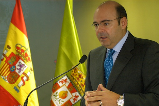 Fotografía de Don Sebastián Pérez Ortiz, Presidente de Granada. Recorte de una imagen original hecha por mí.